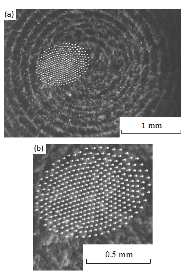 Одна из первых фотографий диссипативной структуры "Капельный кластер", октябрь, 2003 г.